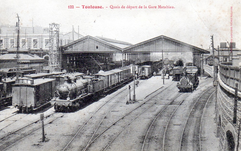 CAPTION: "122 — Toulouse. - Quais de départ de la Gare Matabiau."